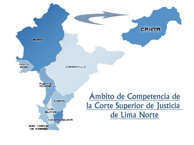 Ambito de Competencia